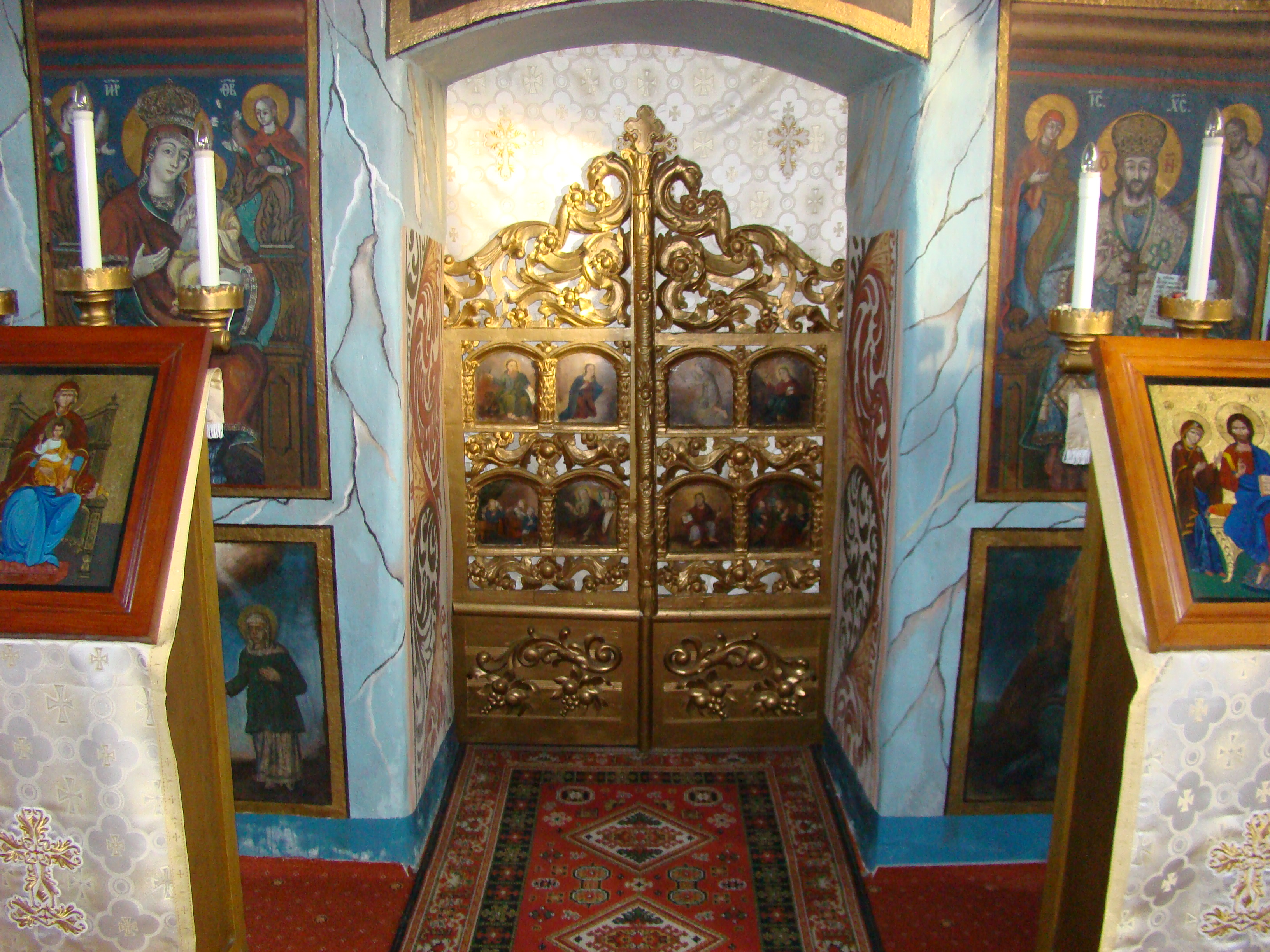 Biserica „Naşterea Născătoarei de Dumnezeu" din Hălmagiu, județul Arad